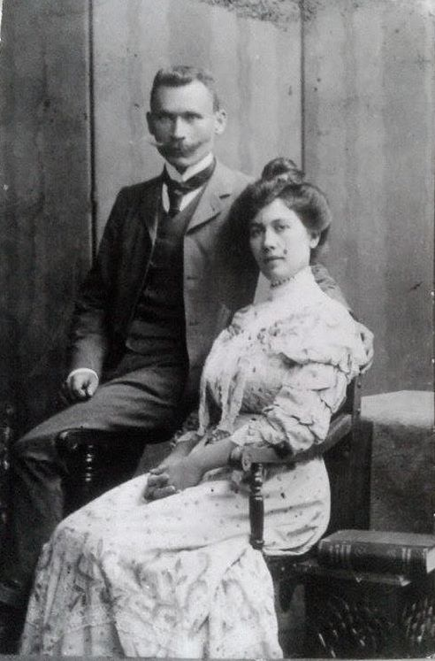 Гоцо Петров (1874-1916) със съпругата си.